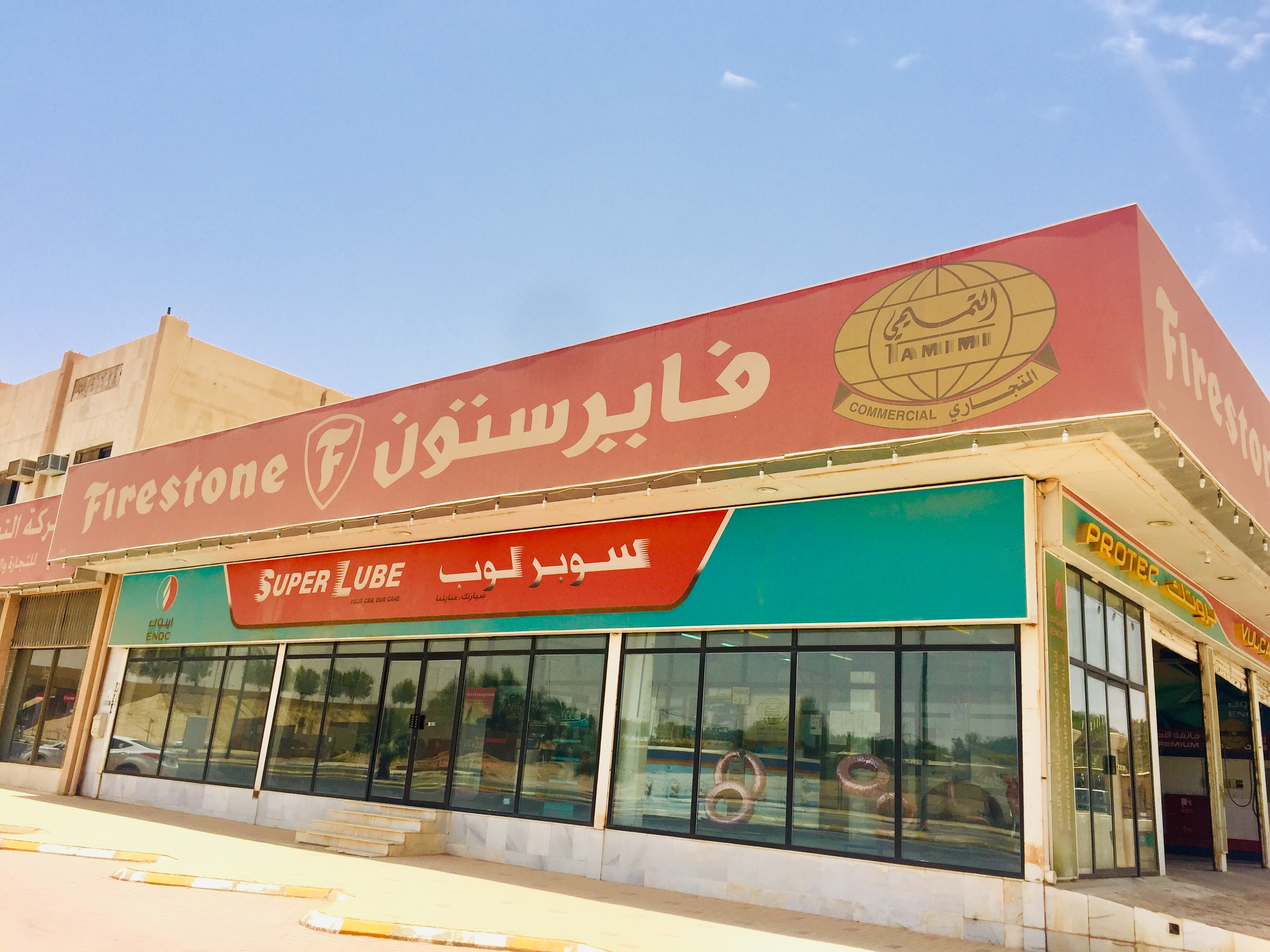 فرع شركة التميمي فايرستون.